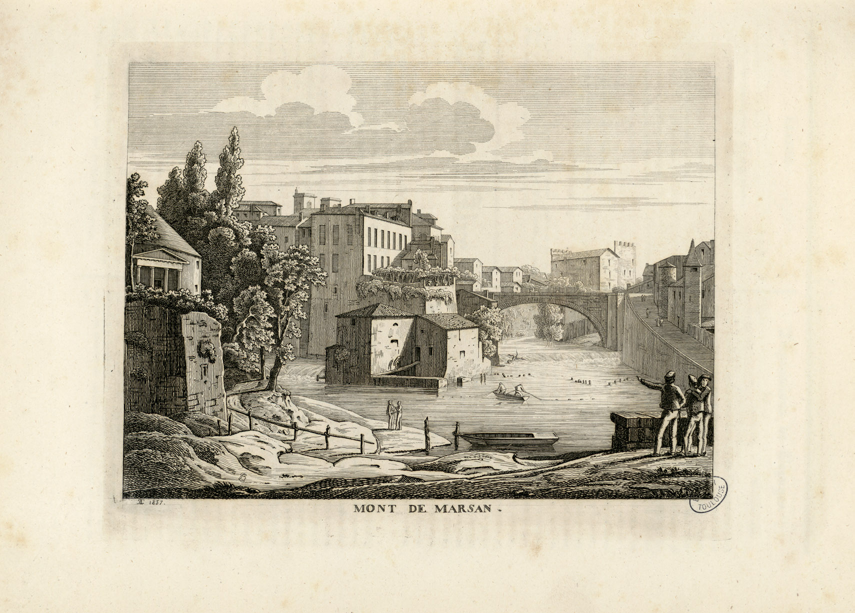 Fait partie d'un recueil des 36 premiers numéros du Pélerin, chaque numéro étant accompagné d'une gravure Ancely, René (1876 - 1966). Possesseur